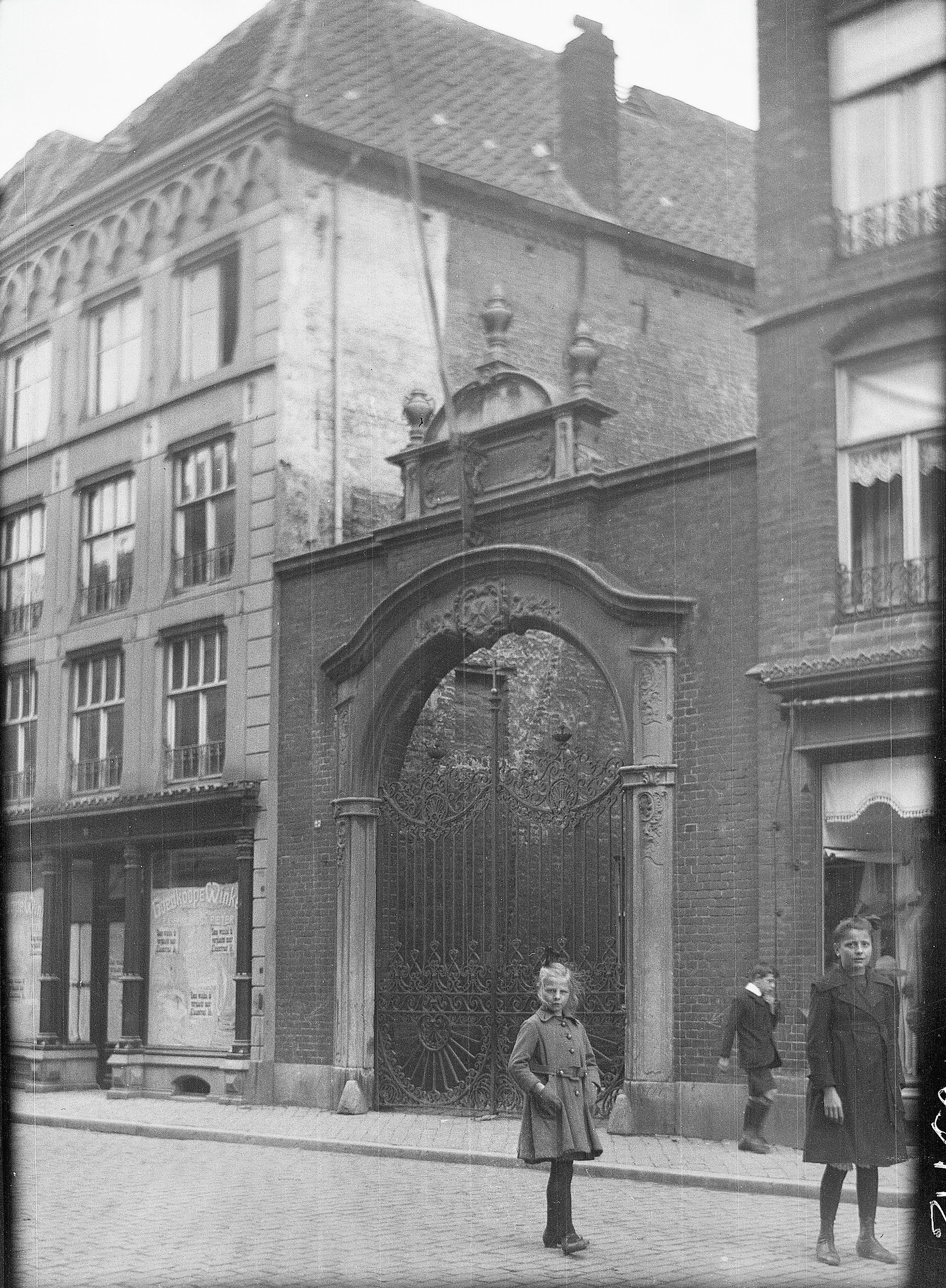 Sint-Nicolaas Kerk: Poortdoorgang in de kerk